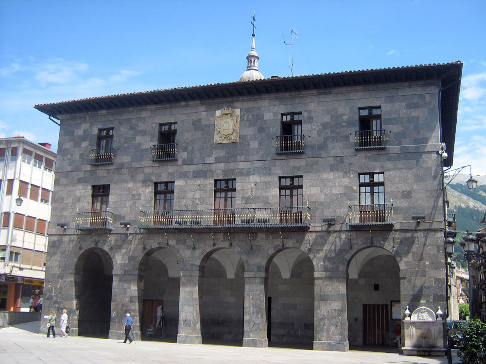 Ayuntamiento o casa consistorial de la localidad guipuzcoana de Azcoitia.